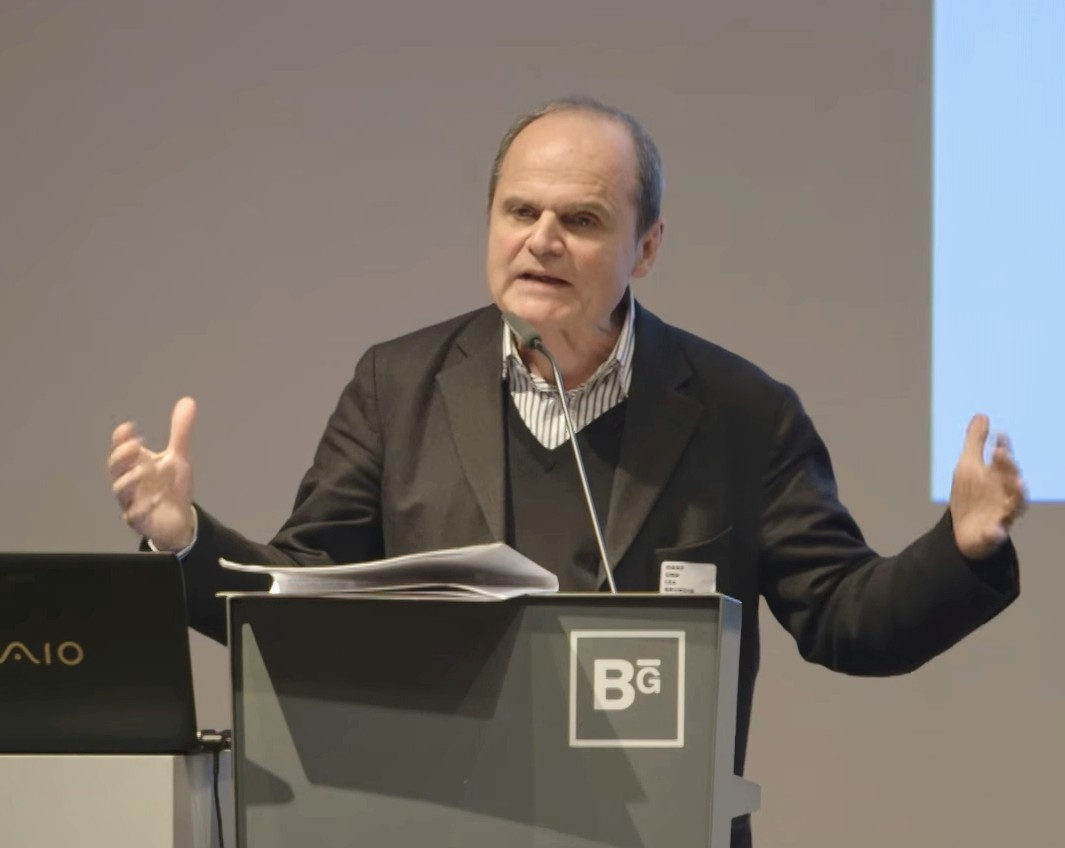 Laudatio für den Preis im Bereich Bildende Kunst. Stiftung verleiht Hans-und-Lea-Grundig-Preis 2015 an Olga Jitlina, Lith Bahlmann und Matthias Reichelt sowie Ines Weizman und ihr Team Berlin, 26.11.2015